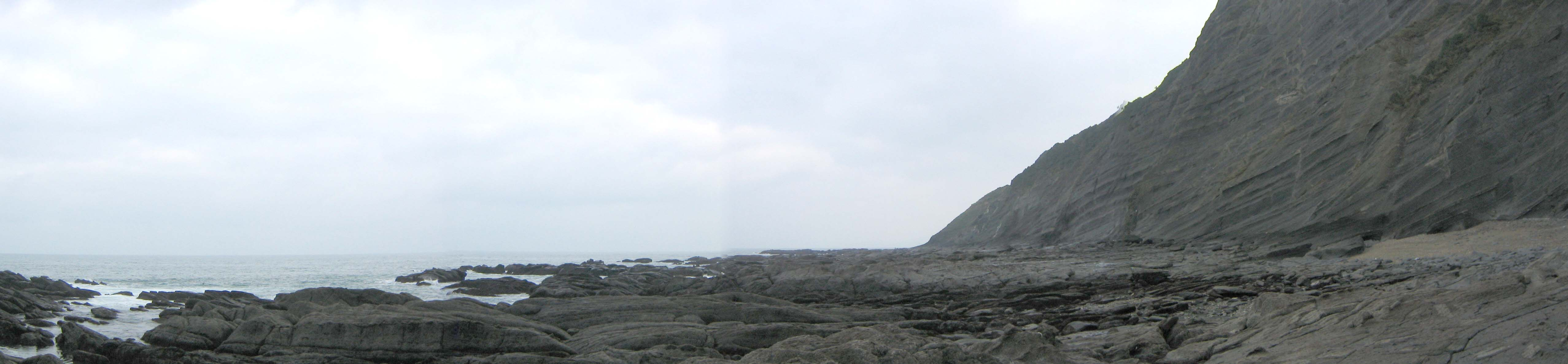 Rasa mareal en Motrico, Guipúzcoa, País Vaco, España.